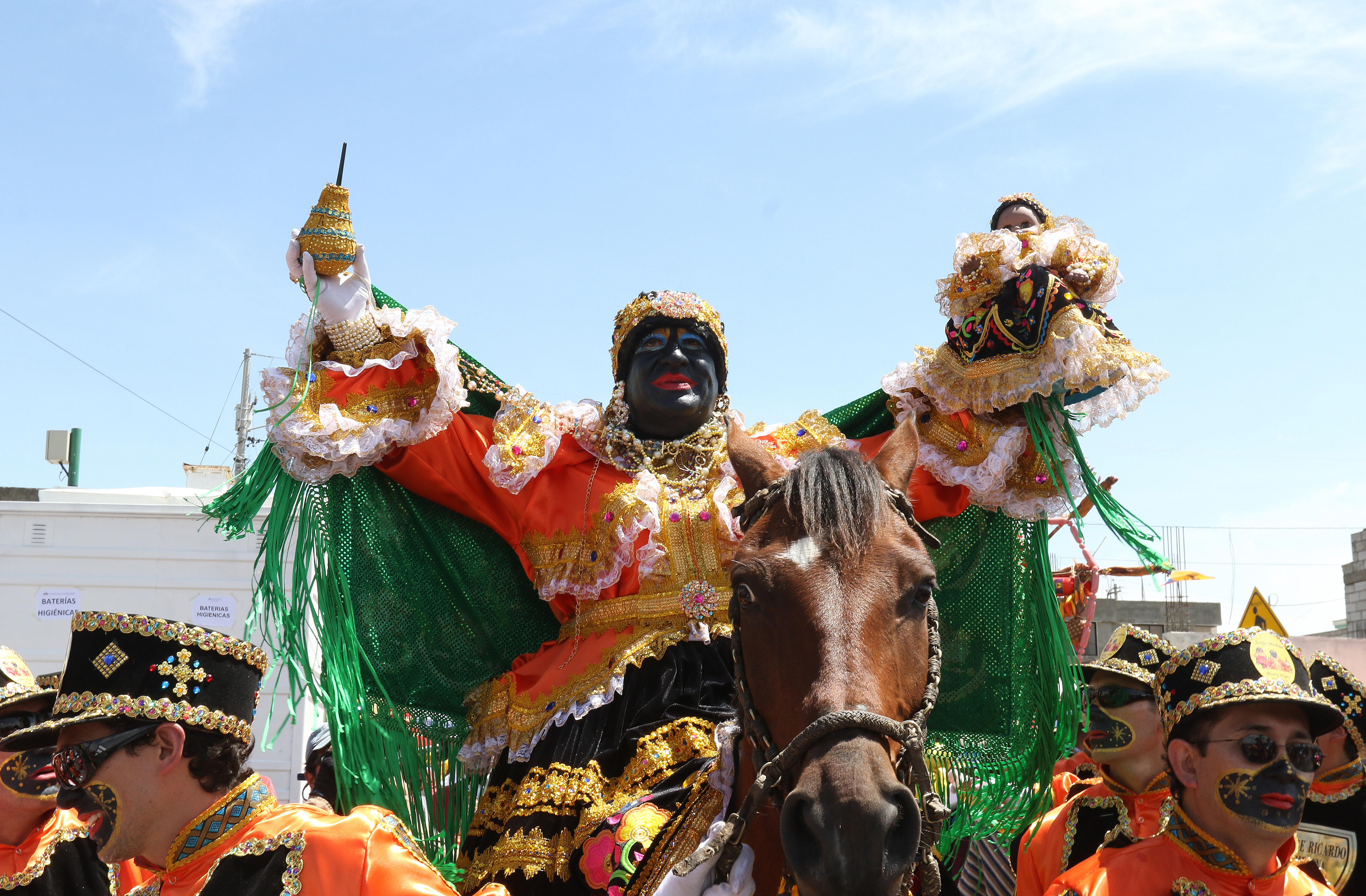 Latacunga, Cotopaxi, 04 de noviembre de 2017 (Andes).- La fiesta de la Mama Negra, que se da en honor a la Virgen de las Mercedes y en conmemoración de los 197 años de Independencia de Latacunga, se cumplió este sábado en la capital de la provincia de Cotopaxi (centro andino) del país. El periodista Jorge Medina fue quien este año represento al personaje principal de esta fiesta. ANDES/Micaela Ayala V.